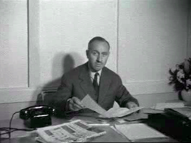 Jacques Goddet, directeur-generaal van de Tour.